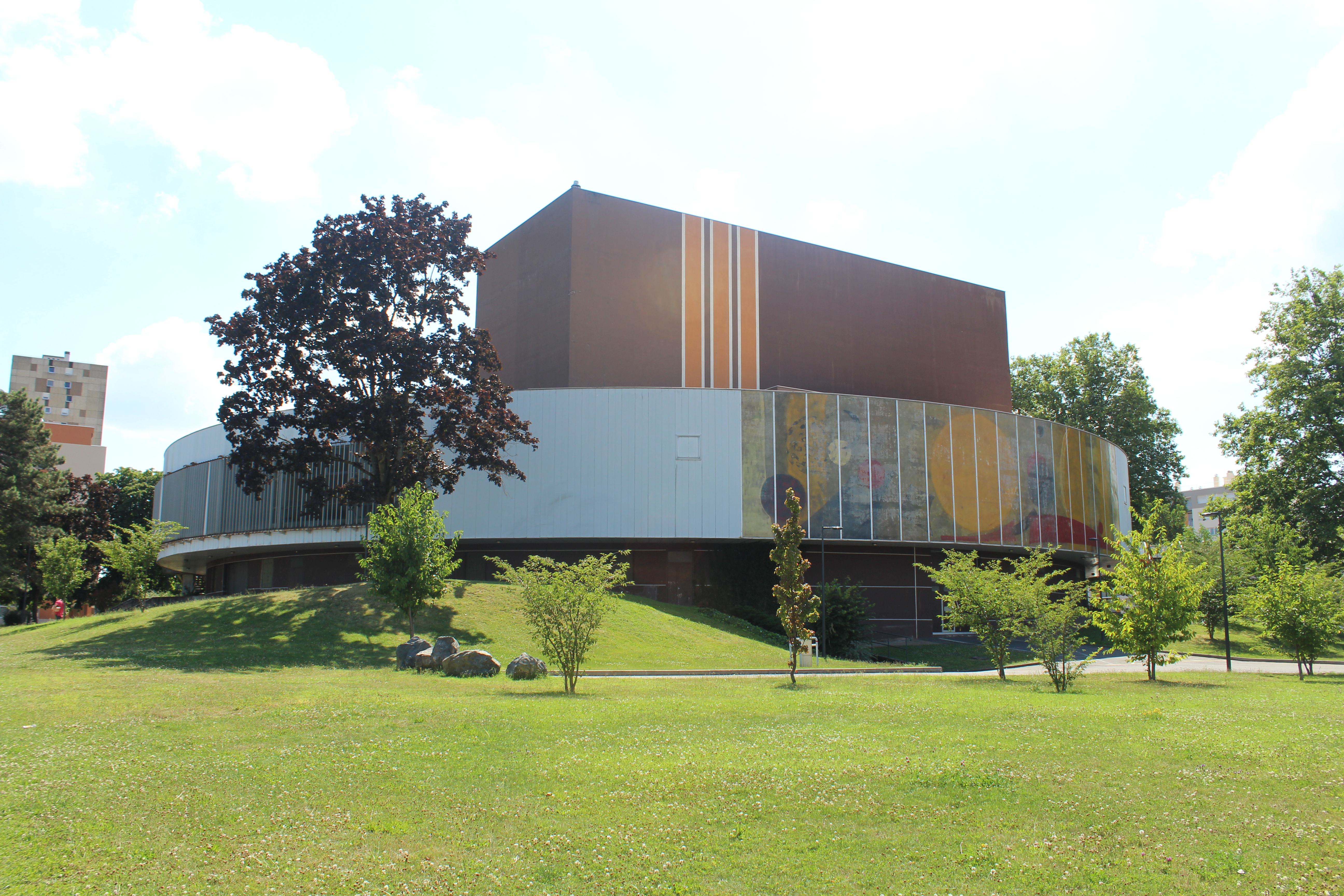 Théâtre Louis Escande à Mâcon.